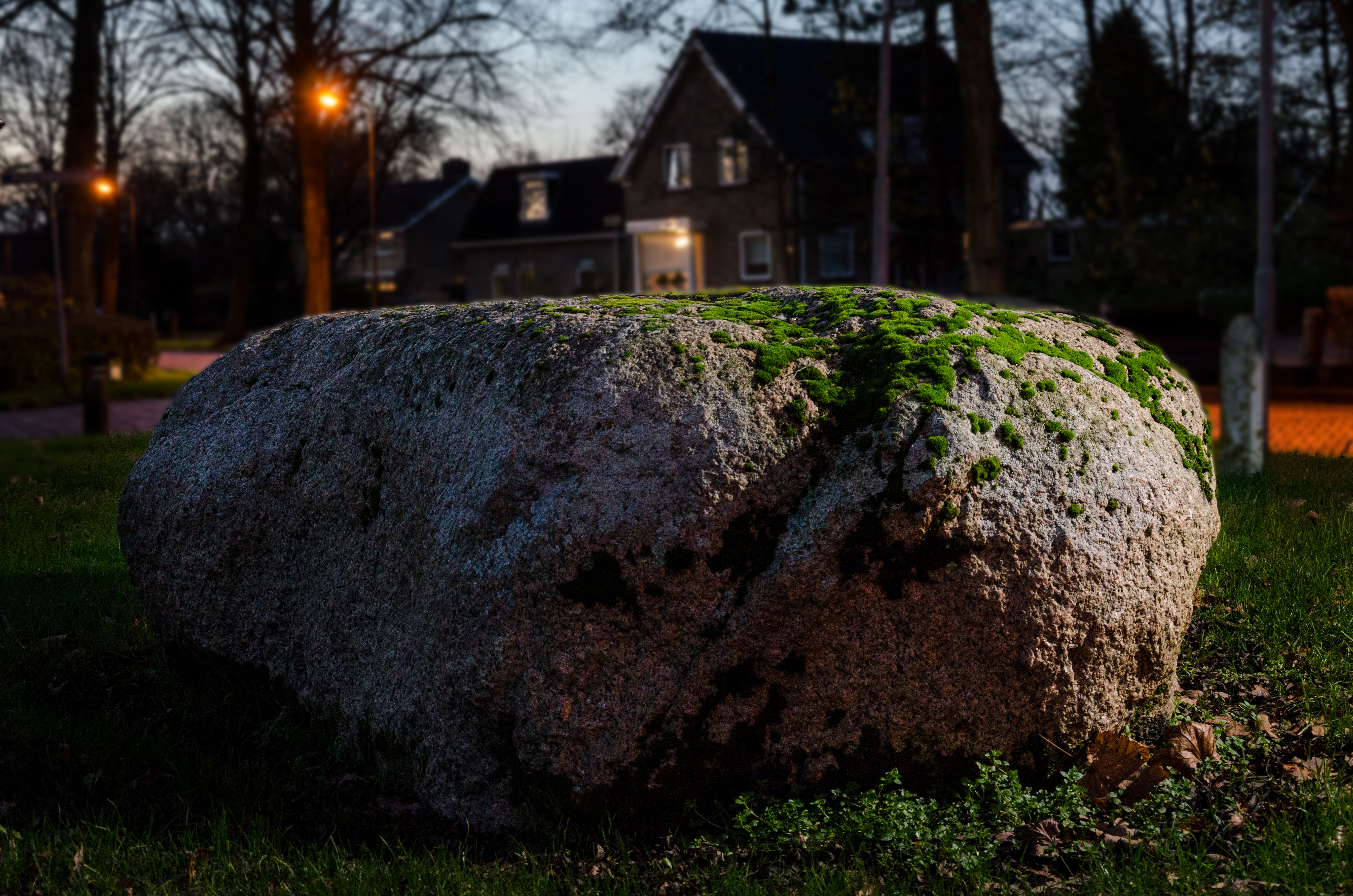 De Poppestien aan de Hillamawei in Burgum.